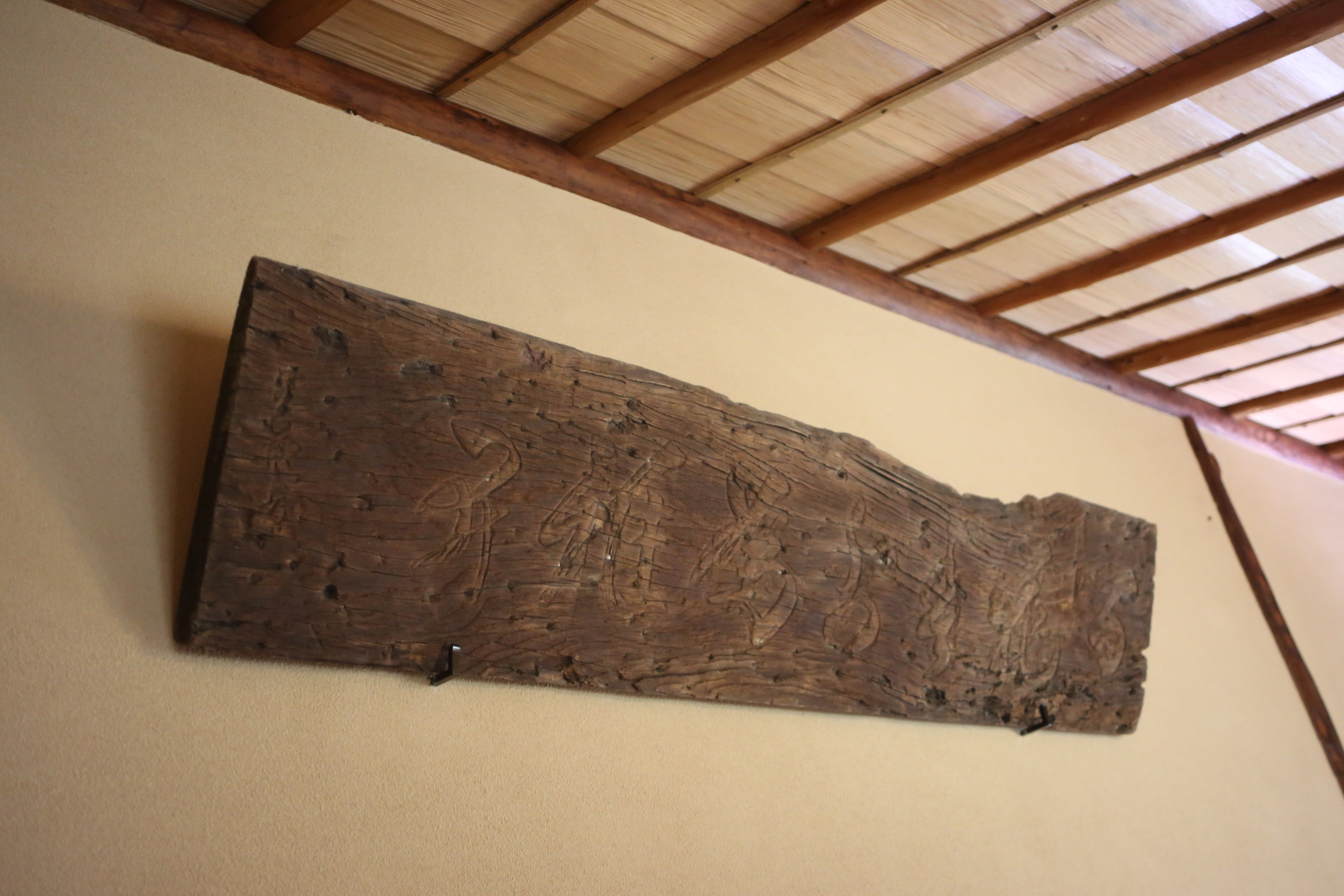 名古屋市昭和区鶴舞の鶴舞公園内百華庵